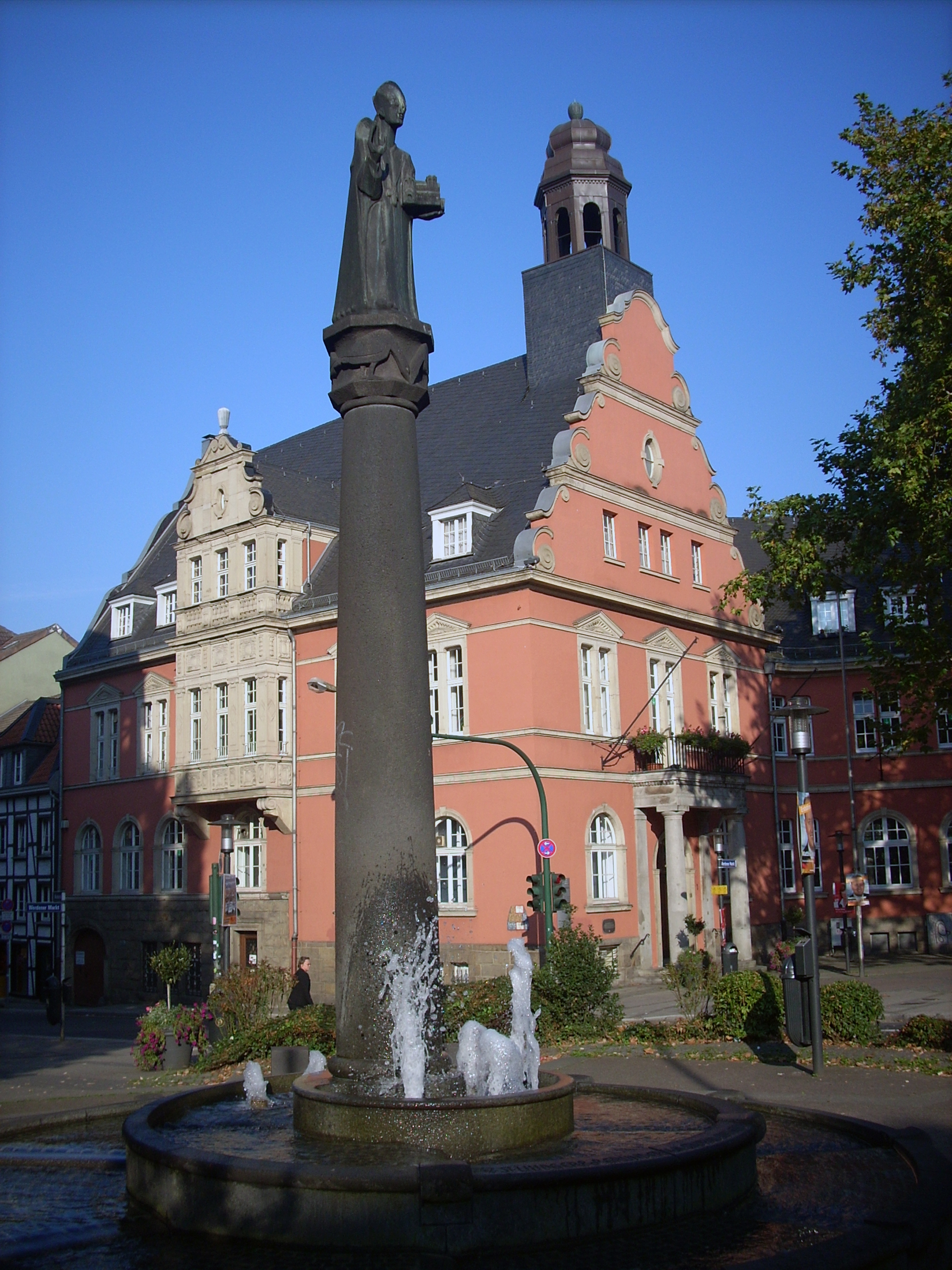 Северный Рейн-Вестфалия, Эссен, Верден - ратуша Вердена